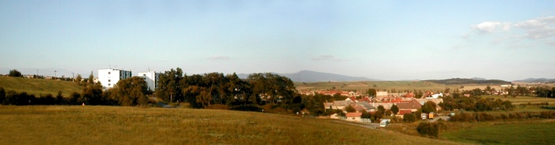 Photo of Lieskovec in Zvolen